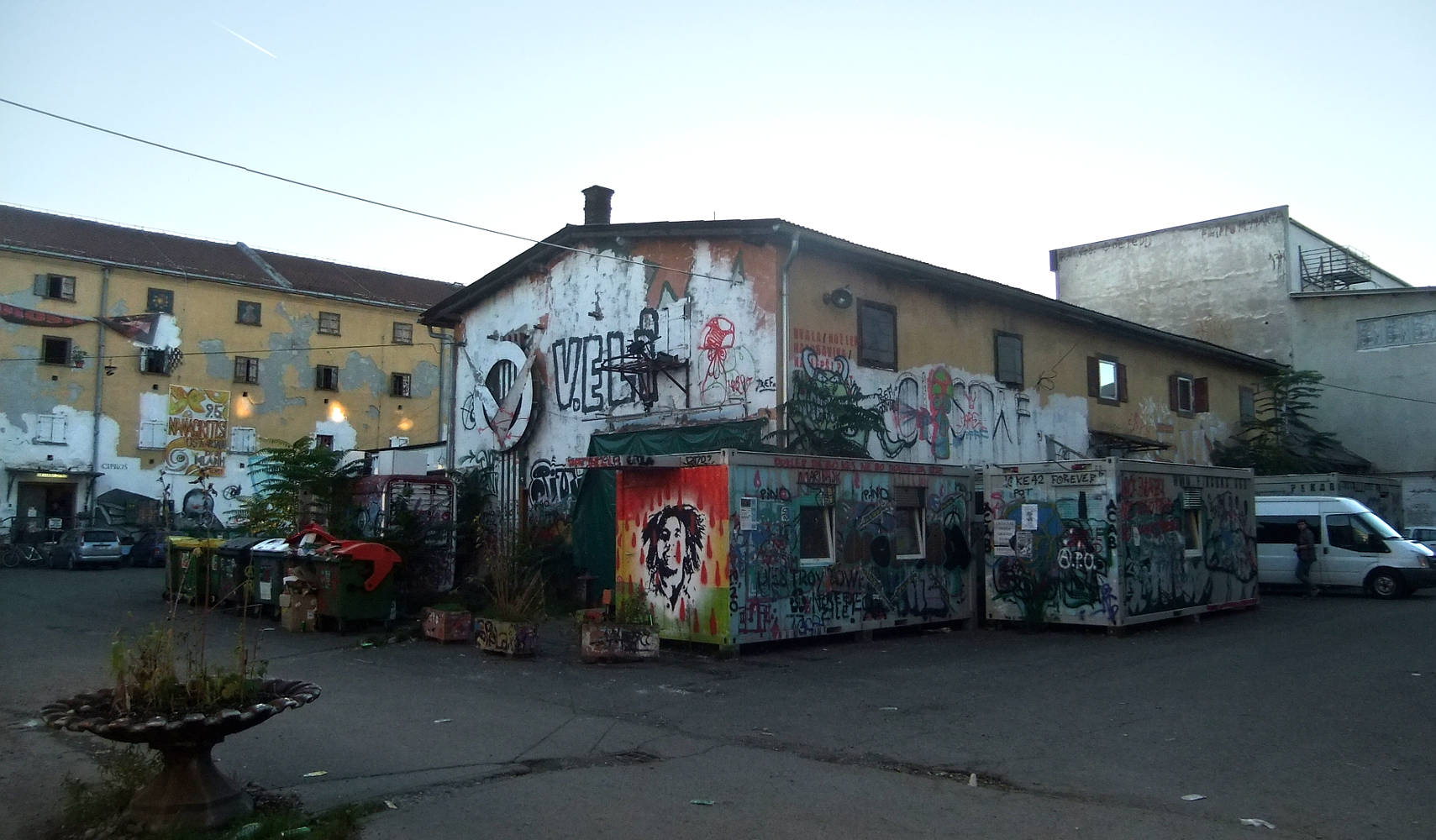 Blick ins Pekarna in Maribor, im Vordergrund die Veranstaltungshalle "Gustaf".